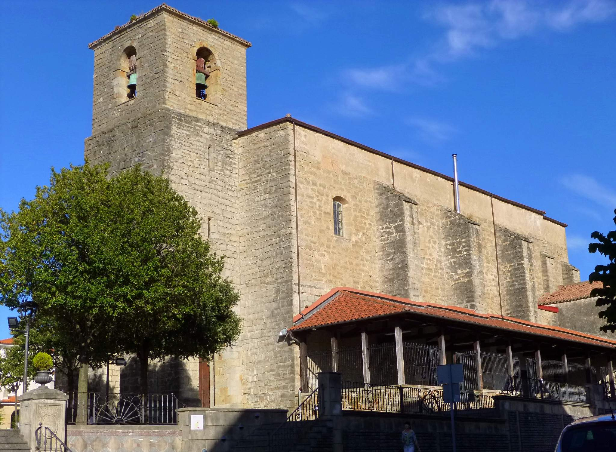 Iglesia de la Purísima Concepción (Gorliz)